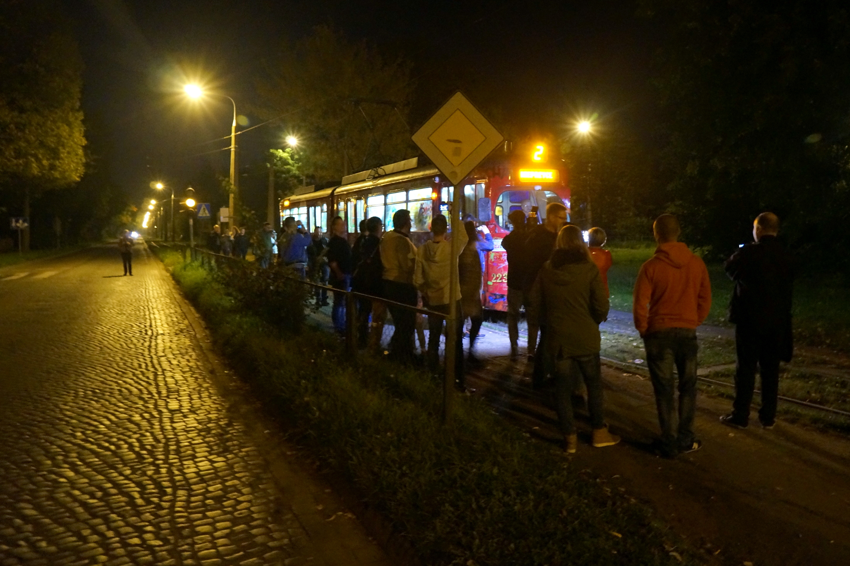 Zawieszenie komunikacji tramwajowej w Gorzowie Wlkp., nastąpiło z chwilą powrotu z trasy ostatniego tramwaju, ok. godz. 23,50 (przystanek tramwajowy "Wieprzyce - końcowy", tramwaj linii 2 - #223). Po przebudowie i rozbudowie sieci tramwajowej, w 2019 r. na tory wyjadą nowoczesne tramwaje PESY Bydgoszcz.